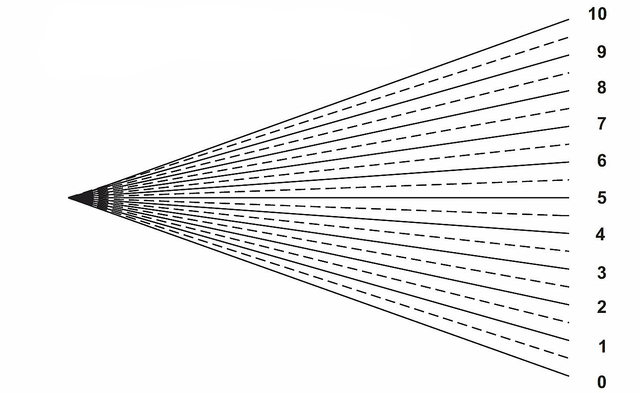 Strahlenbüschel zum Unterteilen von Gitterquadraten